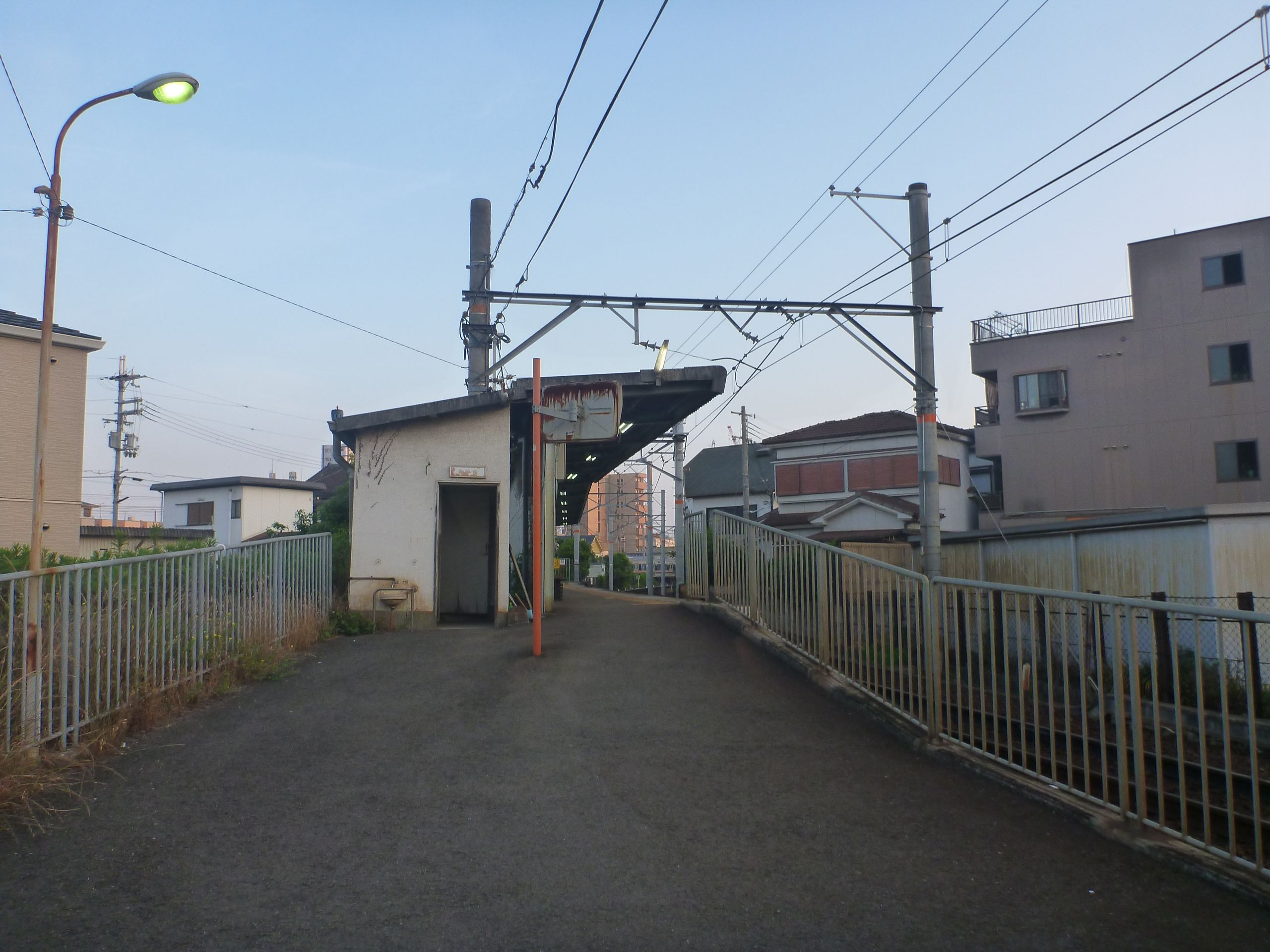 Tanakaguchi Station, Wakayama Electric Railway